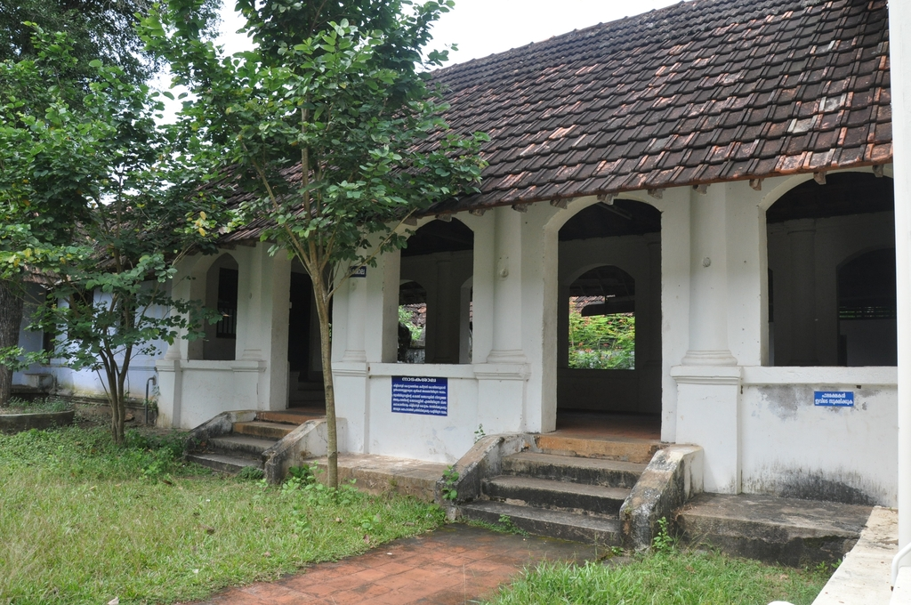 കിളിമാനൂര്‍ കോവിലകത്തെ നാടകശാല